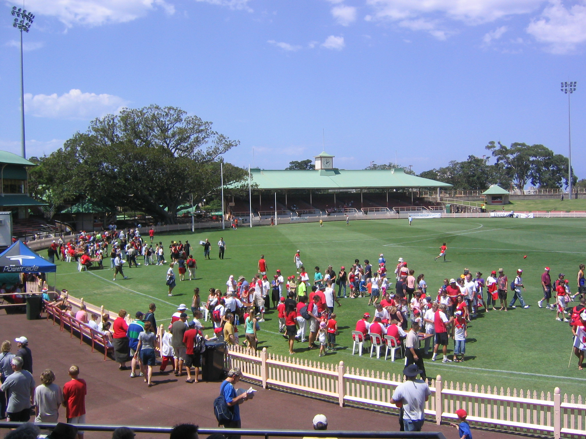 Sydney Swans vs Essendon